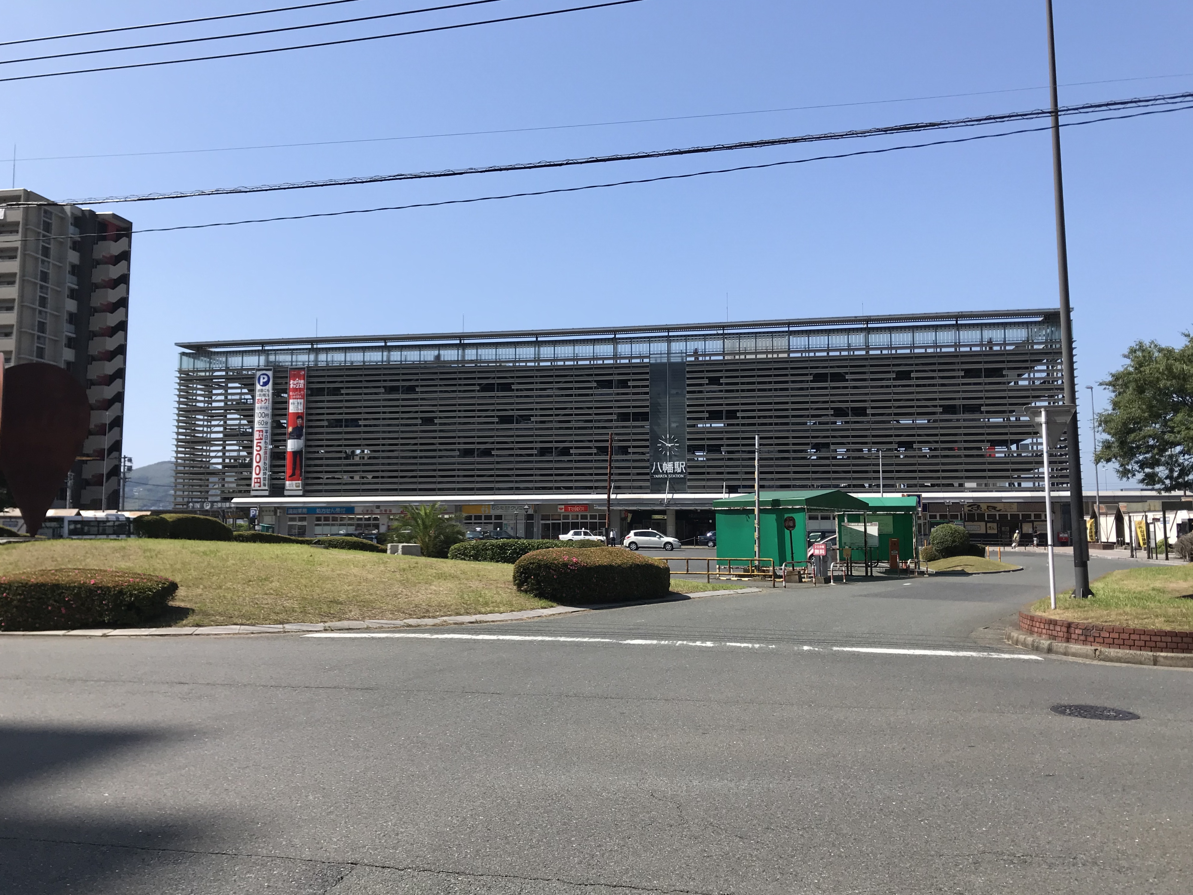 八幡駅の駅舎